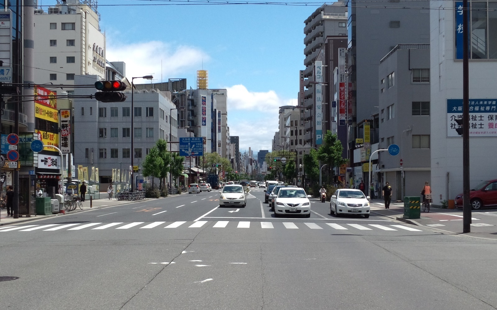 天神橋筋・天神橋六交差点